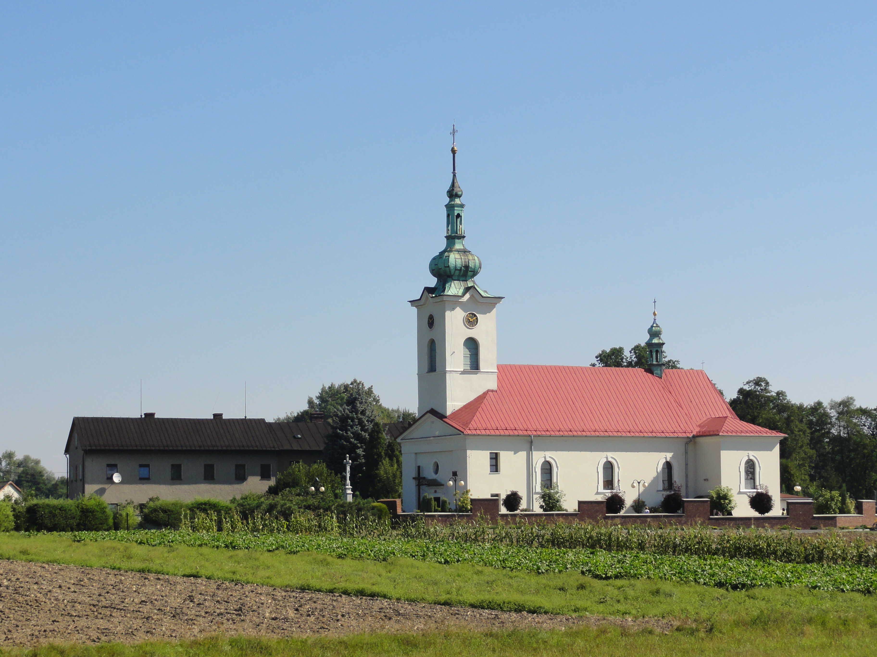 Kościół św. Józefa w Zabrzegu